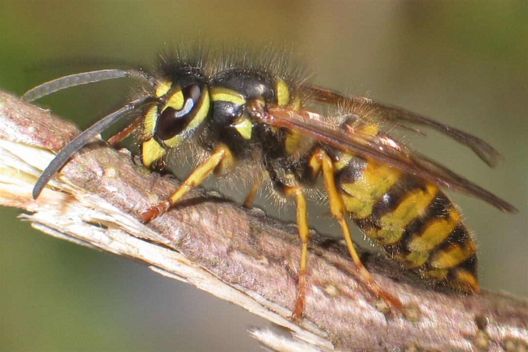 Gemeine Wespe (Vespula vulgaris)